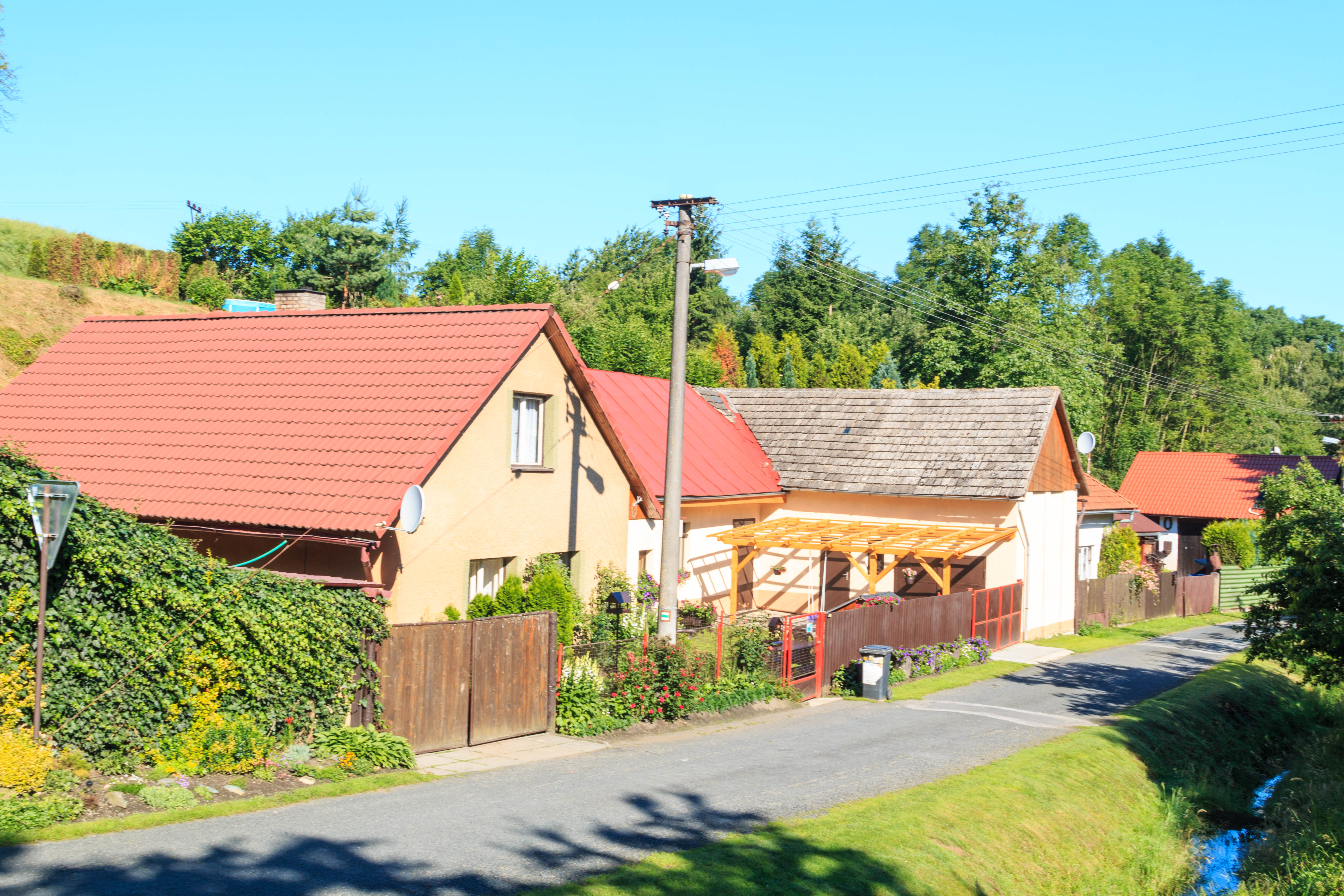 Jakubovice u Vilémova č. 19